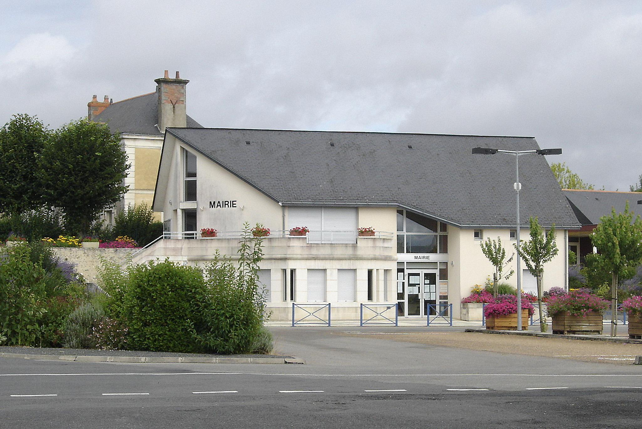 Mairie de Saint-Martin-d'Arcé (Maine-et-Loire)